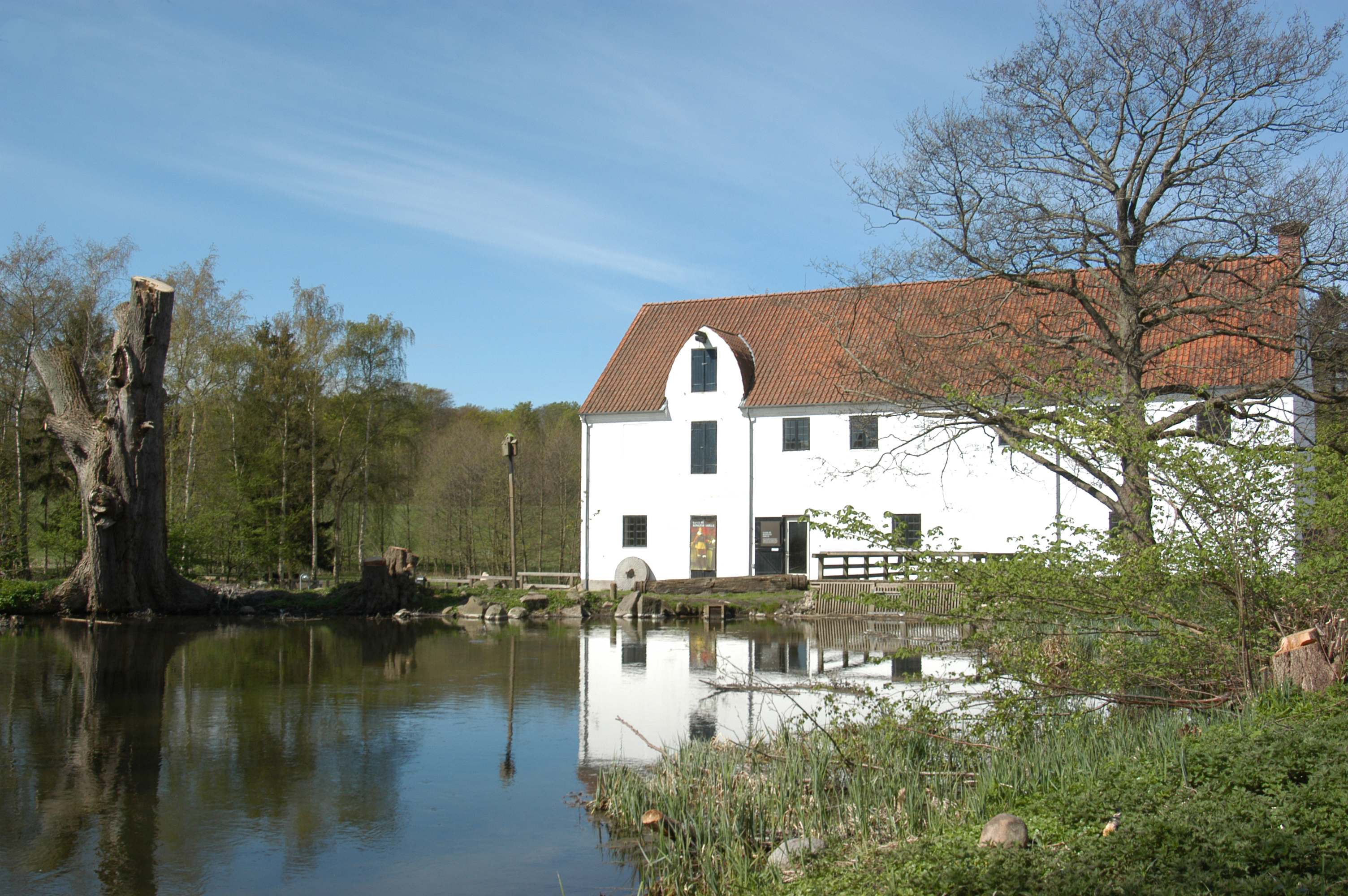 Esrum Møllegård, vandmølle, elektricitetsværk og Naturcenter befinder sig ved Esrum i nordsjælland. Moulin à eau de Møllegård au nordsjælland au Danemark.